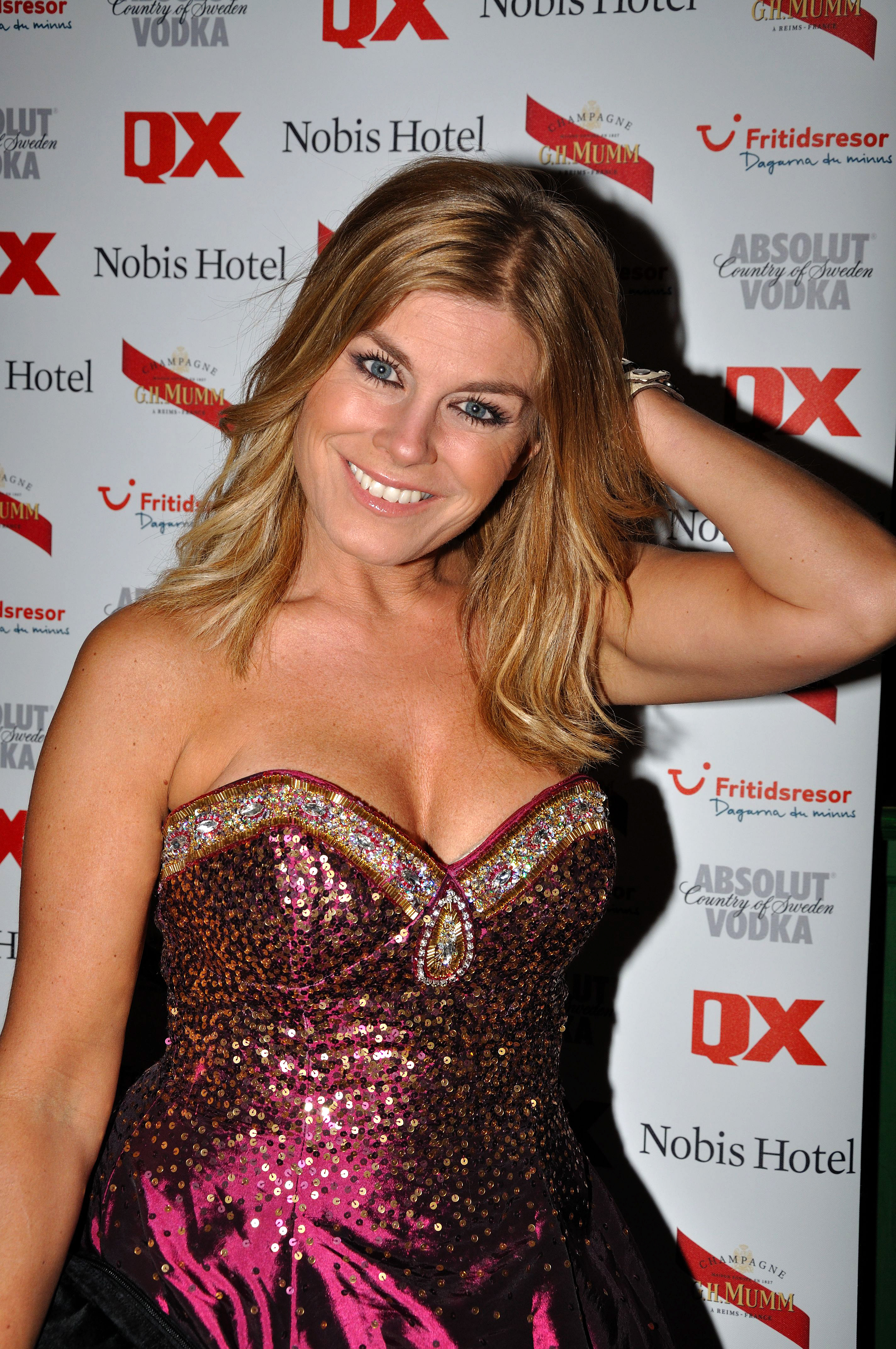 Gaygalan 2011 Pernilla Wahlgren